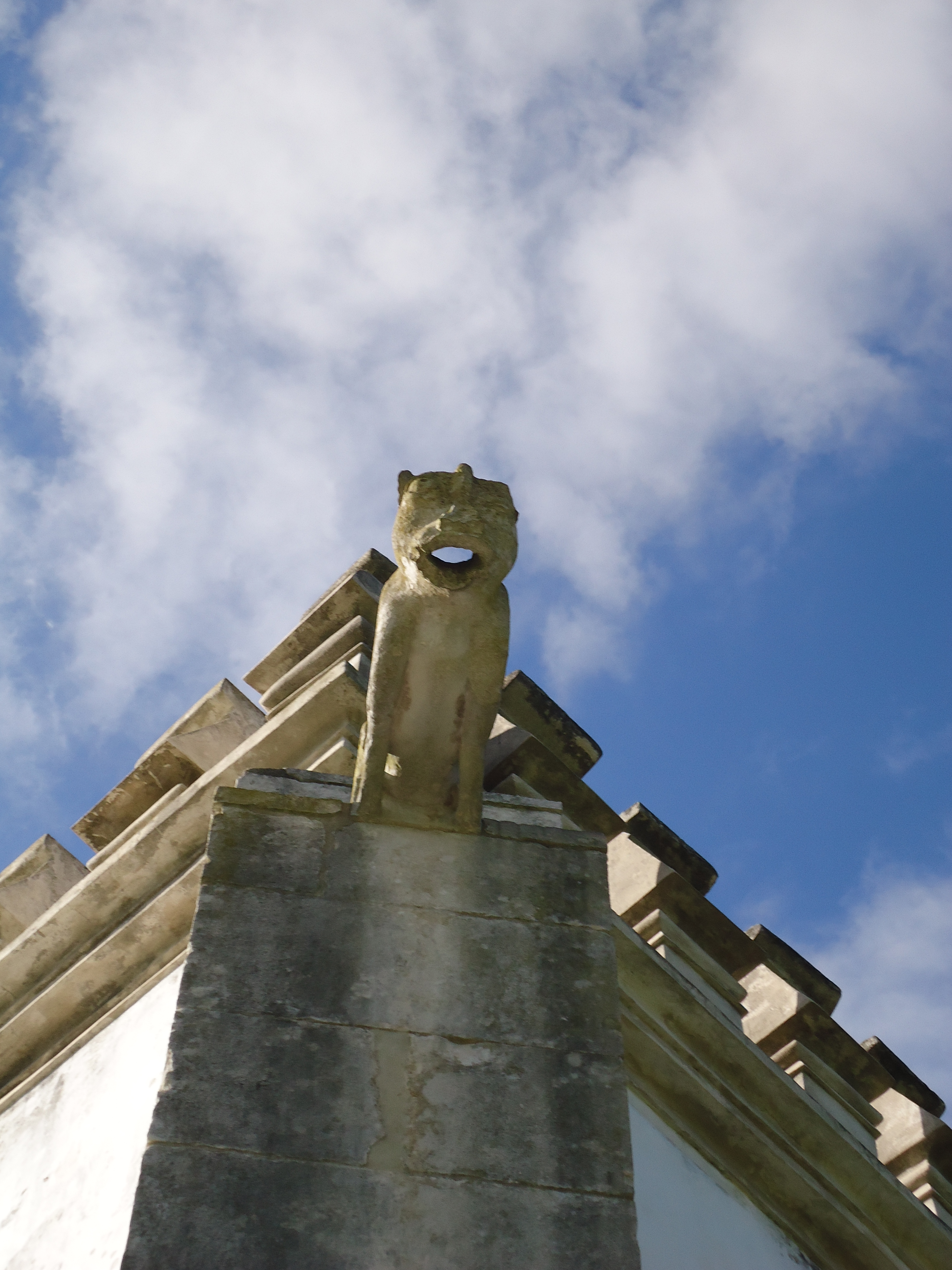 Capela de São Jorge, Centro de Interpretação Batalha de Aljubarrota, freguesia de Calvaria de Cima, concelho de Porto de Mós, distrito de Leiria, Portugal: gárgula.